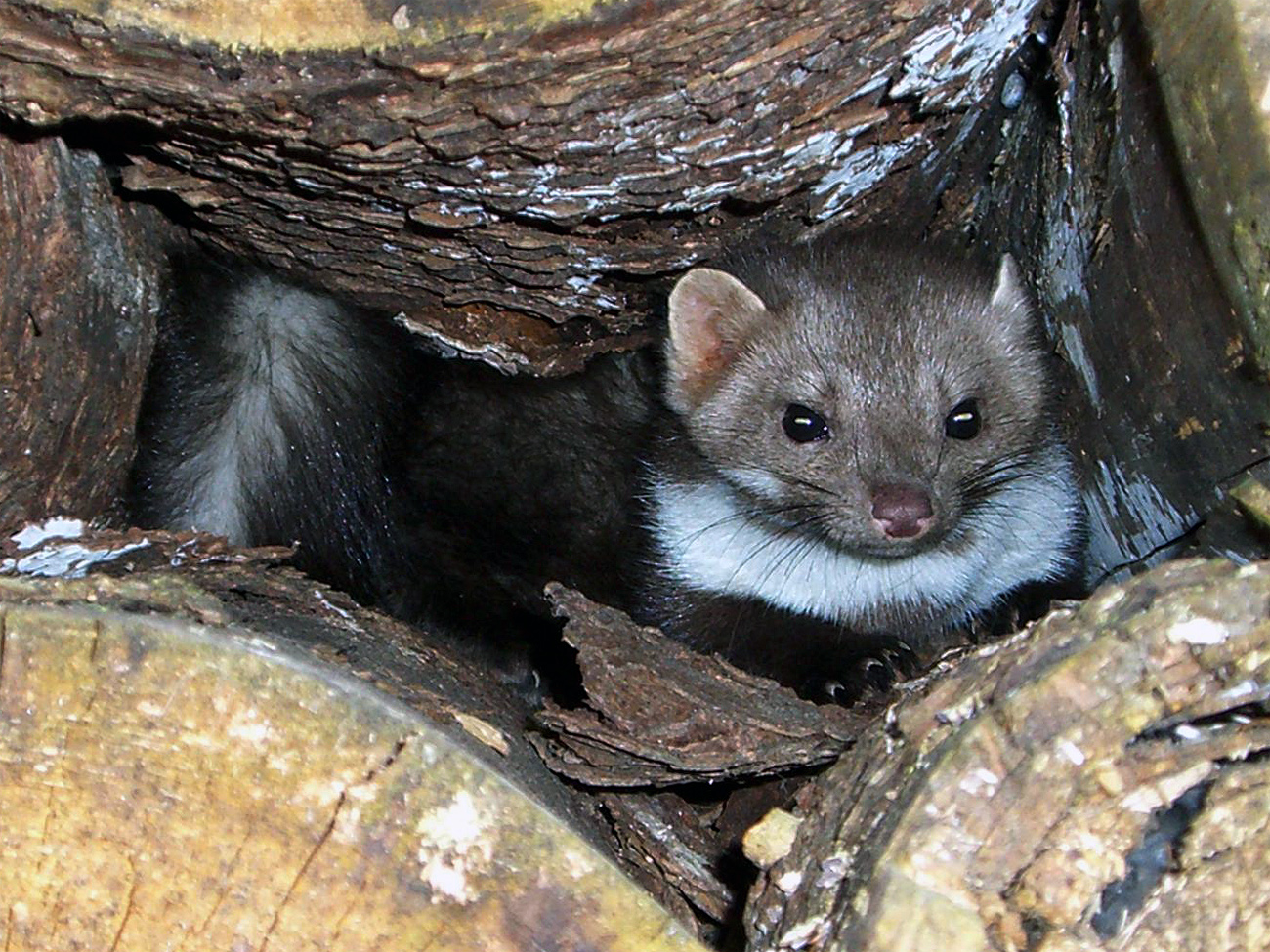 Steinmarder (Martes foina) in einem Holzstoß